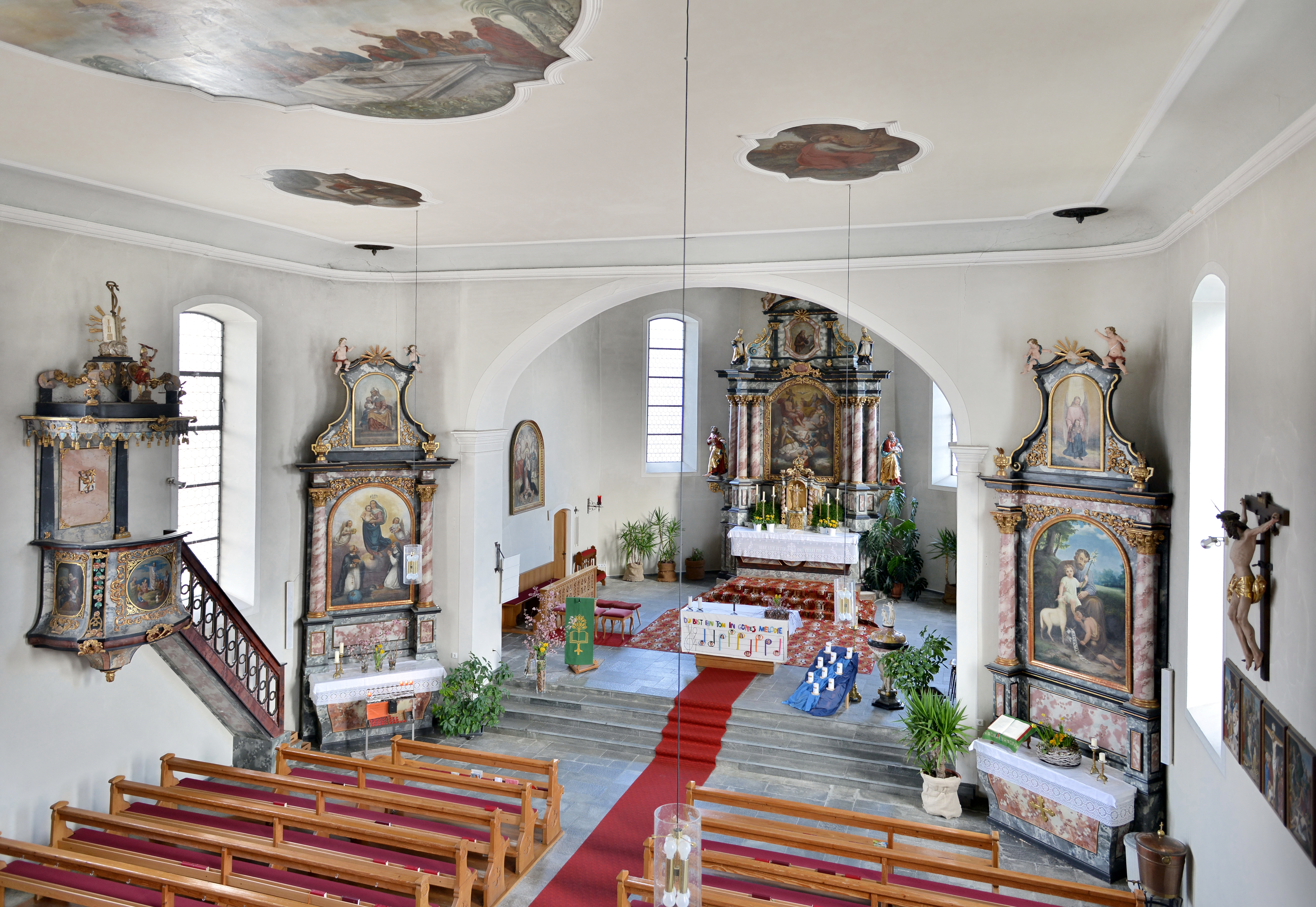 Pfarrkirche hl. Martin in Krumbach, Vorarlberg.